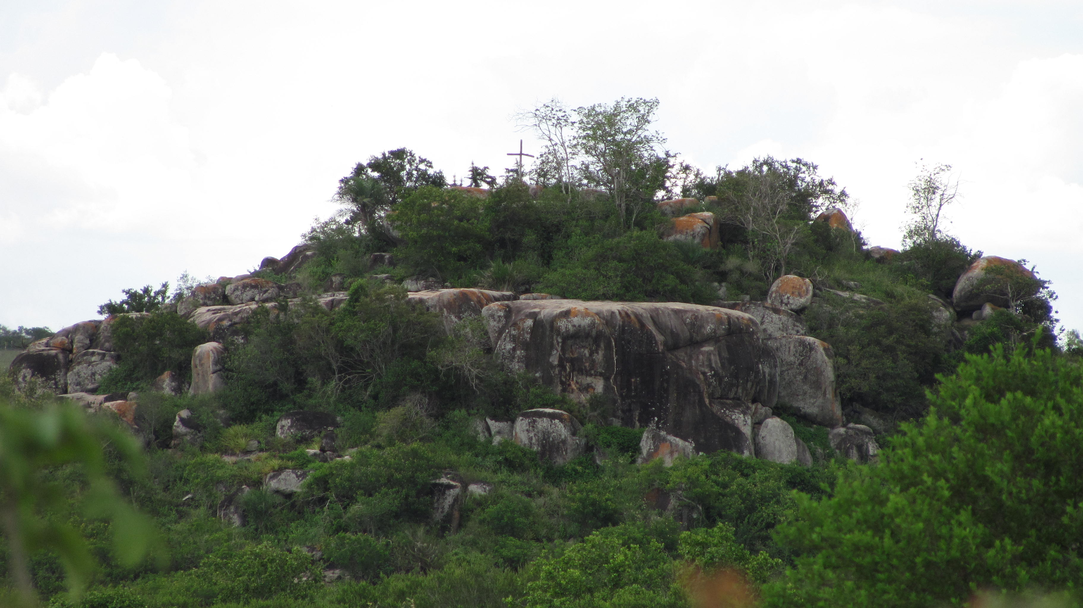 Monte do Cruzeiro, também conhecido como Serrote, no Povoado de Bela Vista, ás margens do Rio Carnaíba, município de Araci